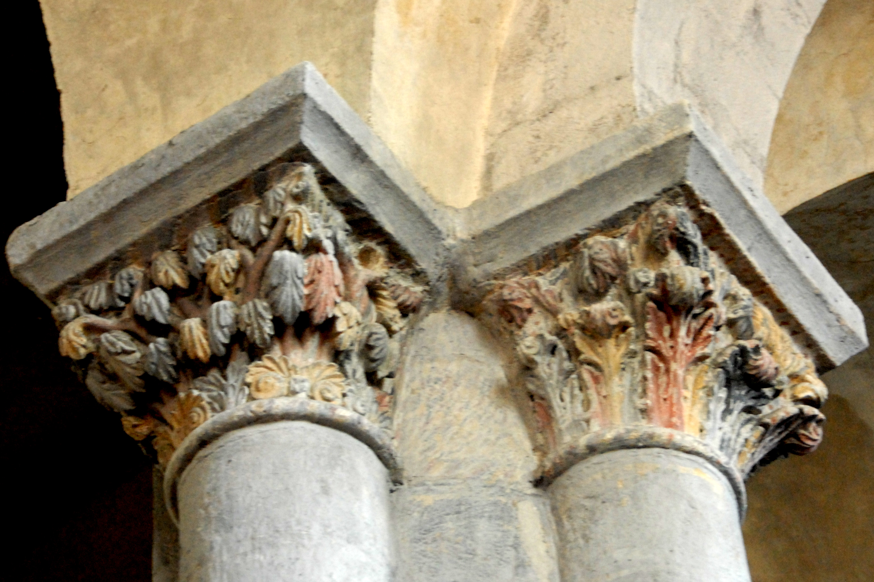 Mozac, 2 Kapitelle mit Blattwerk